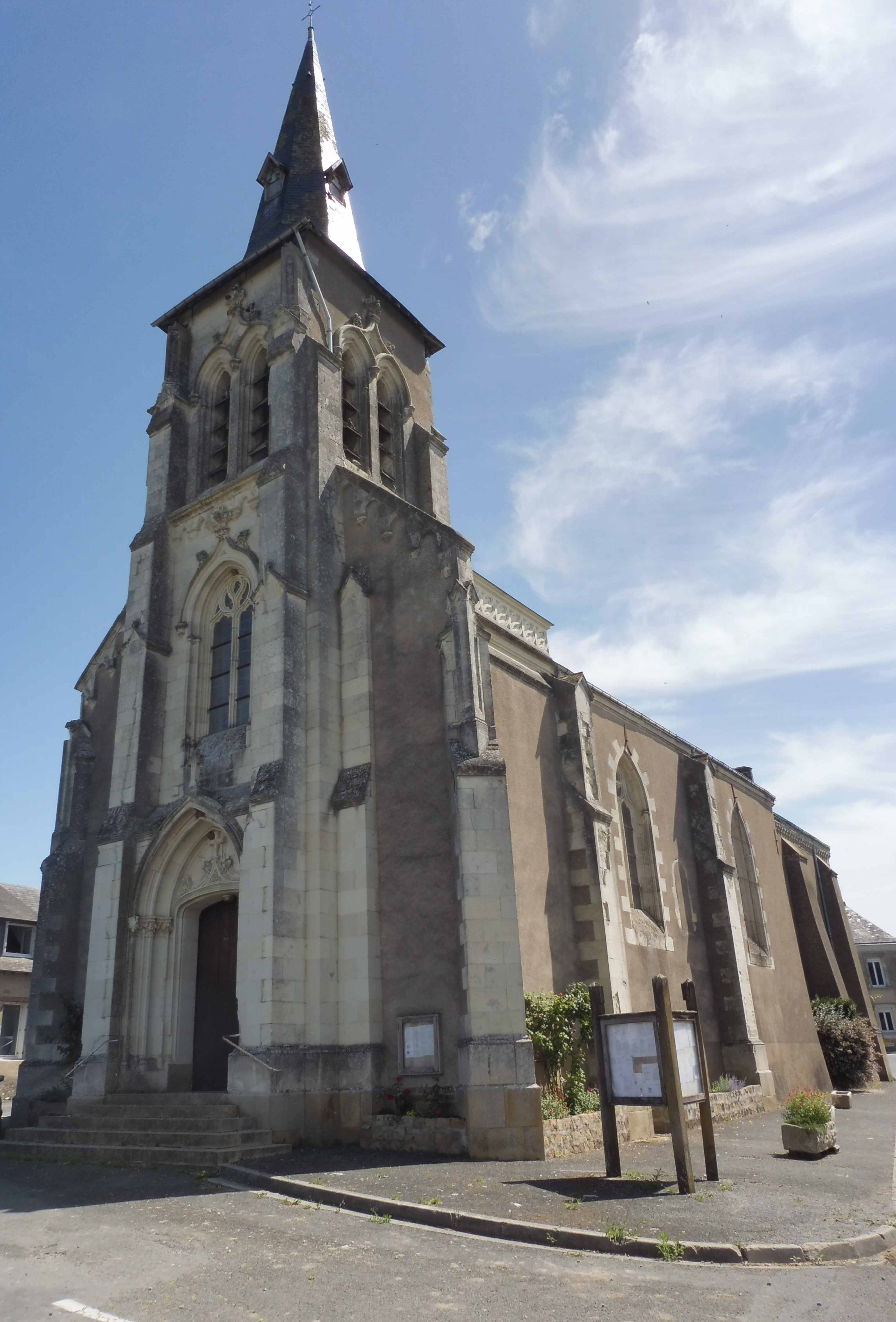 L'église du village de Querré